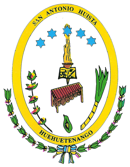 Escudo en el cual se encuentran los elementos representativos de San Antonio Huista